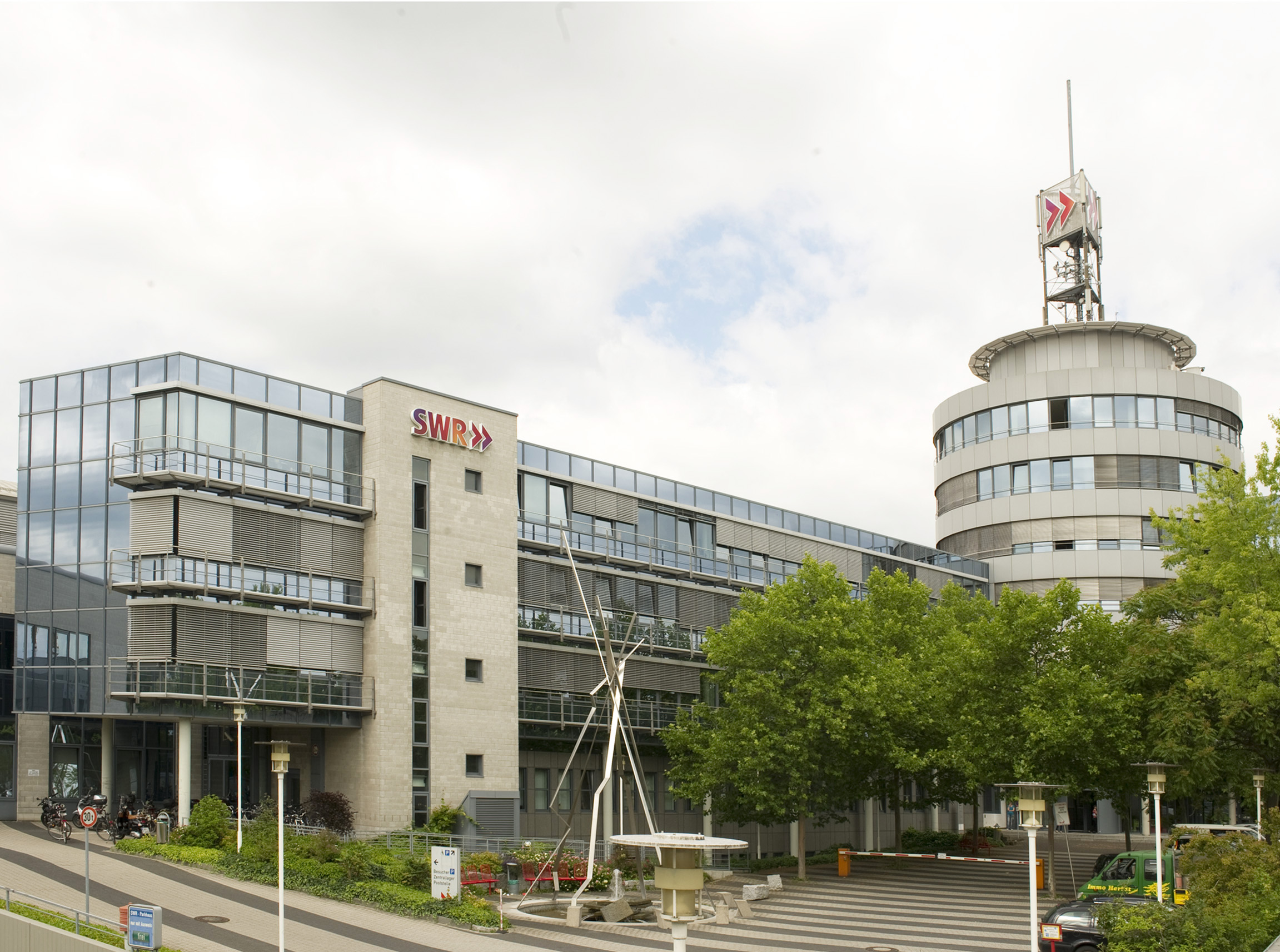 SWR Funkhaus Mainz 2014